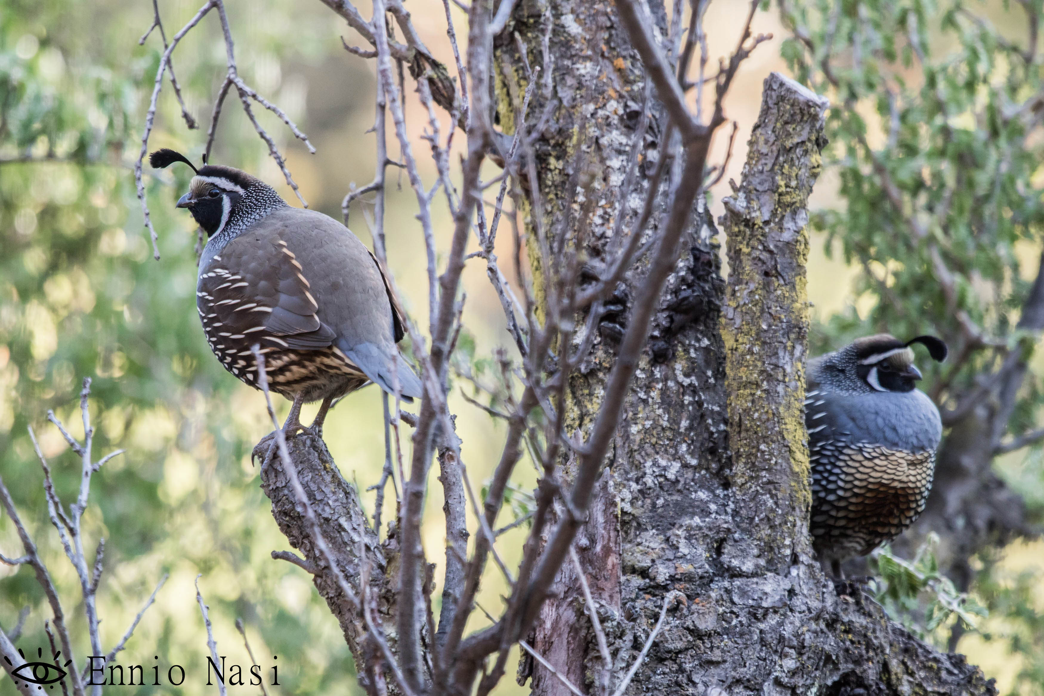 Codornices Californiana fotografiada en El Arrayán, sector ubicado en la Región metropolitana, Chile.